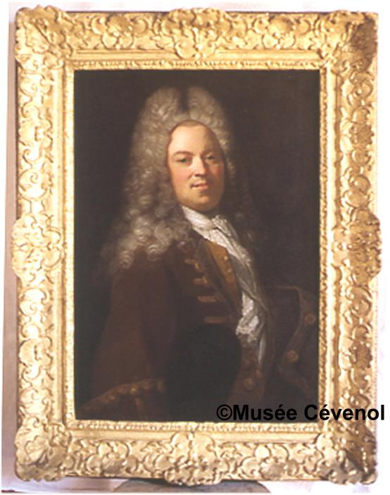 Portrait du financier Abraham Peyrenc de Moras